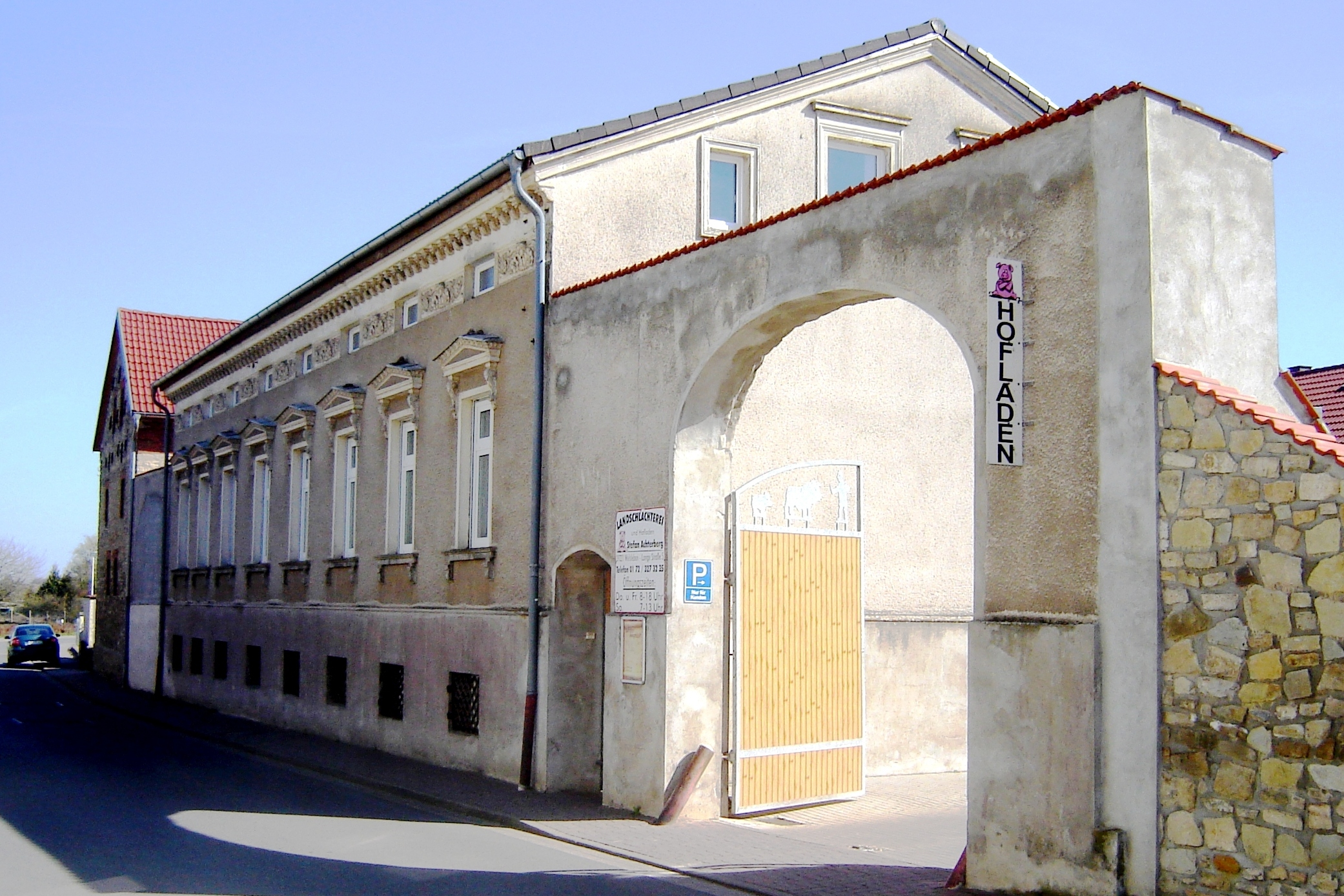 Welsleben (Sachsen-Anhalt), Lange Straße 5, Bauernhof (Kulturdenkmal)